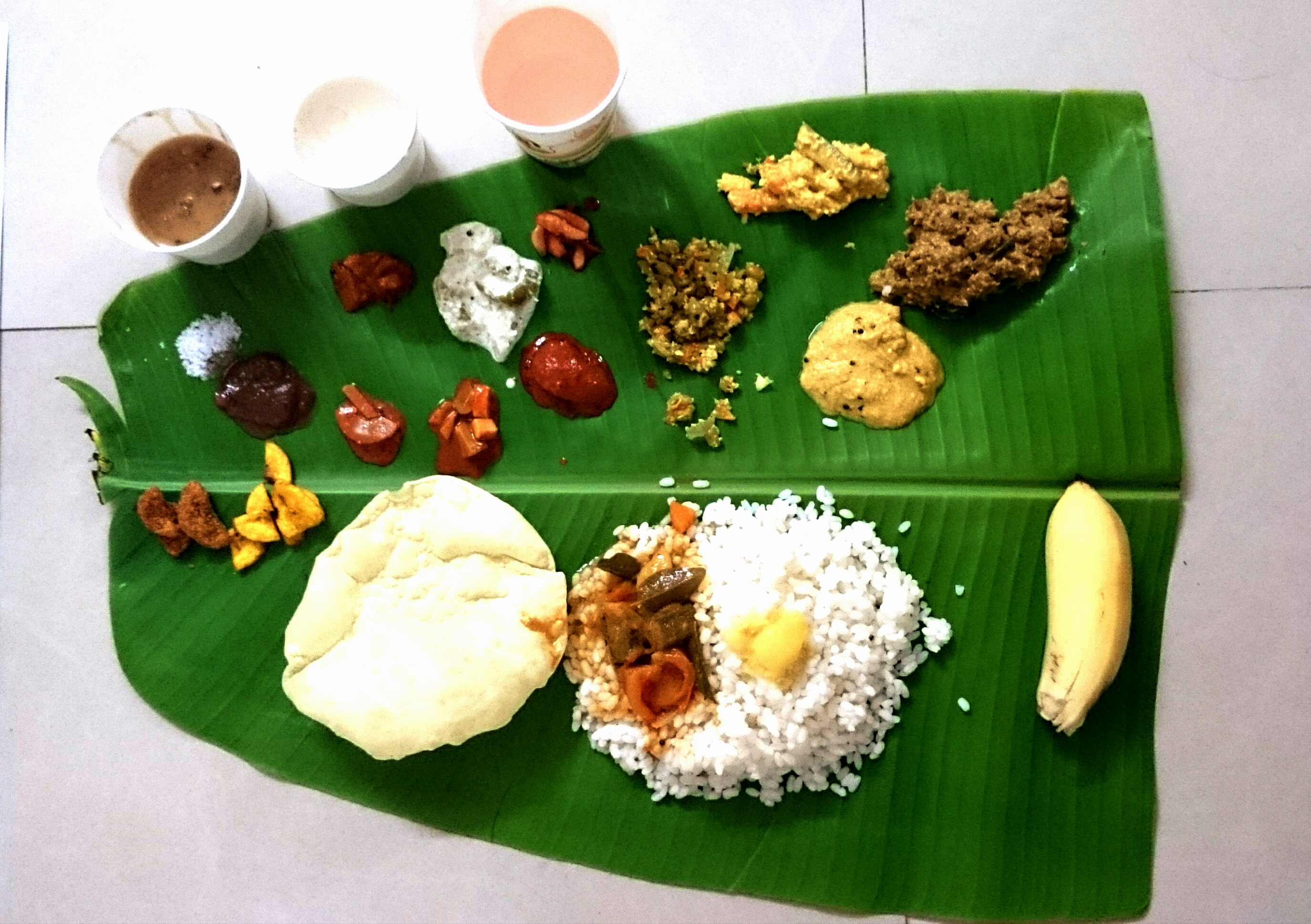 Onam Sadya 2014